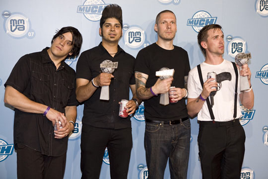 MMVAs